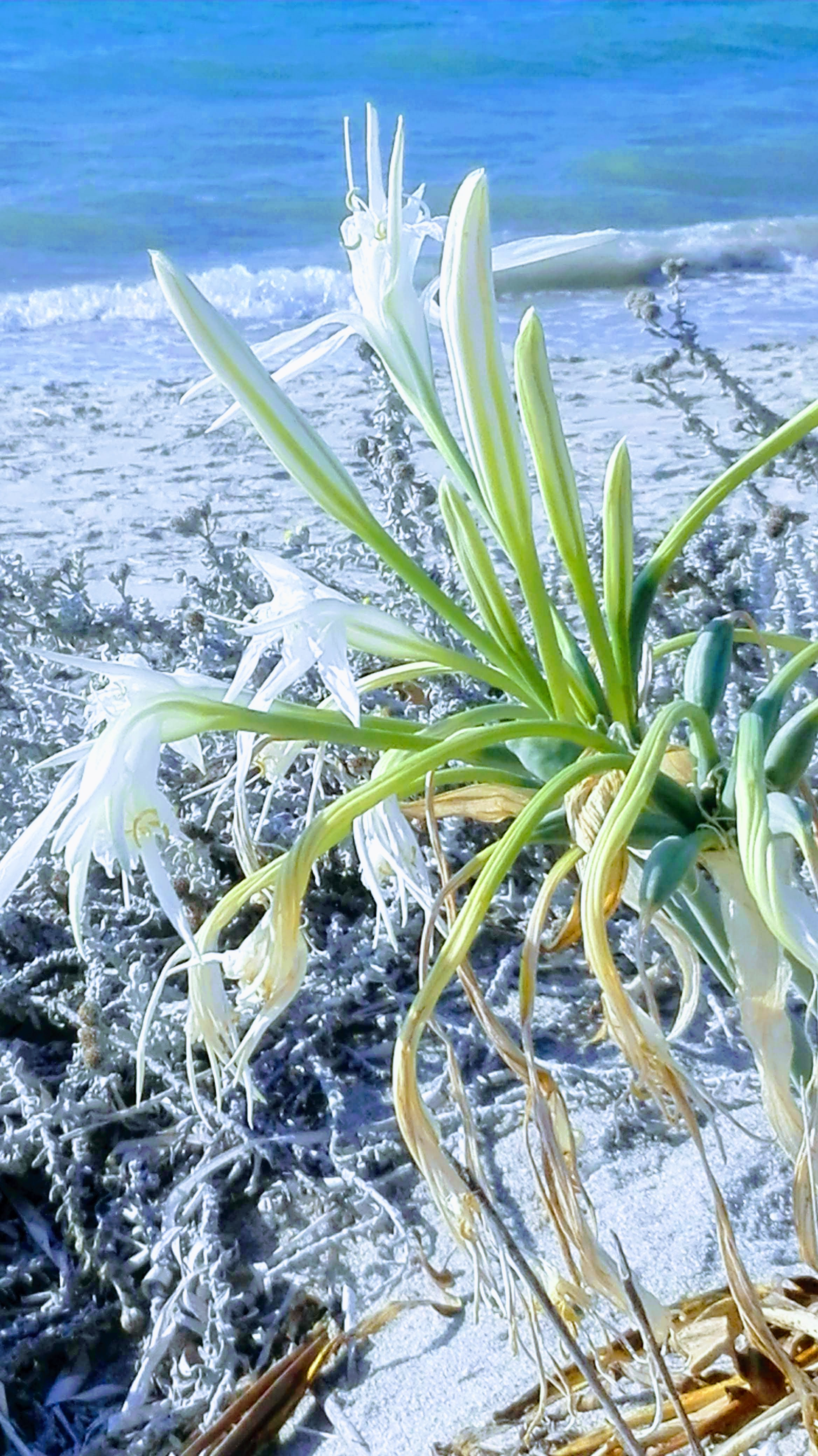 ΑΥΤΑ ΦΥΤΡΩΝΟΥΝ ΠΑΡΑΛΙΑΚΑ ΤΟΝ ΑΥΓΟΥΣΤΟ This is a photography of Natura 2000 protected area with ID GR4210008